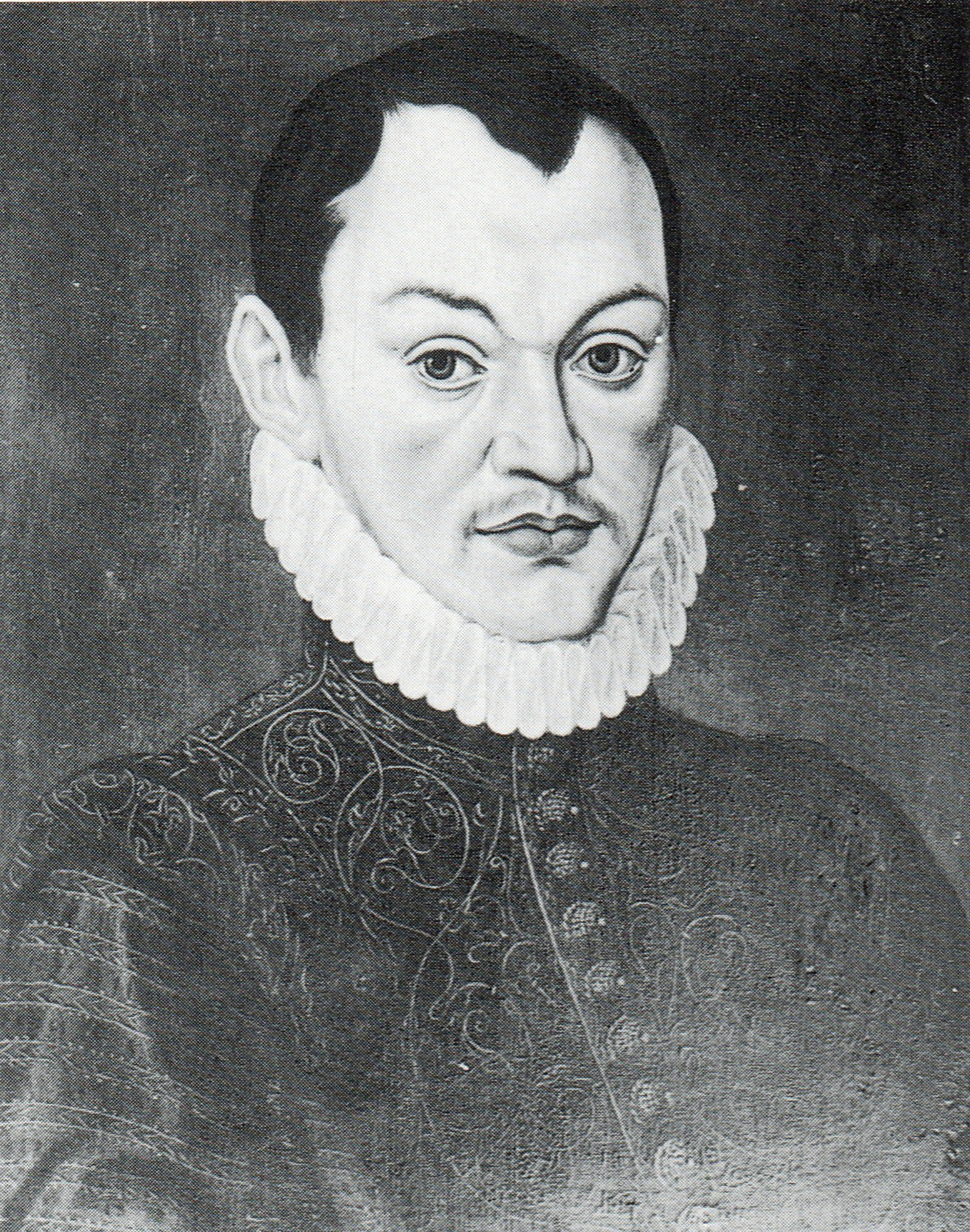 Ölgemälde von Herzog Albrecht Friedrich in Preußen.